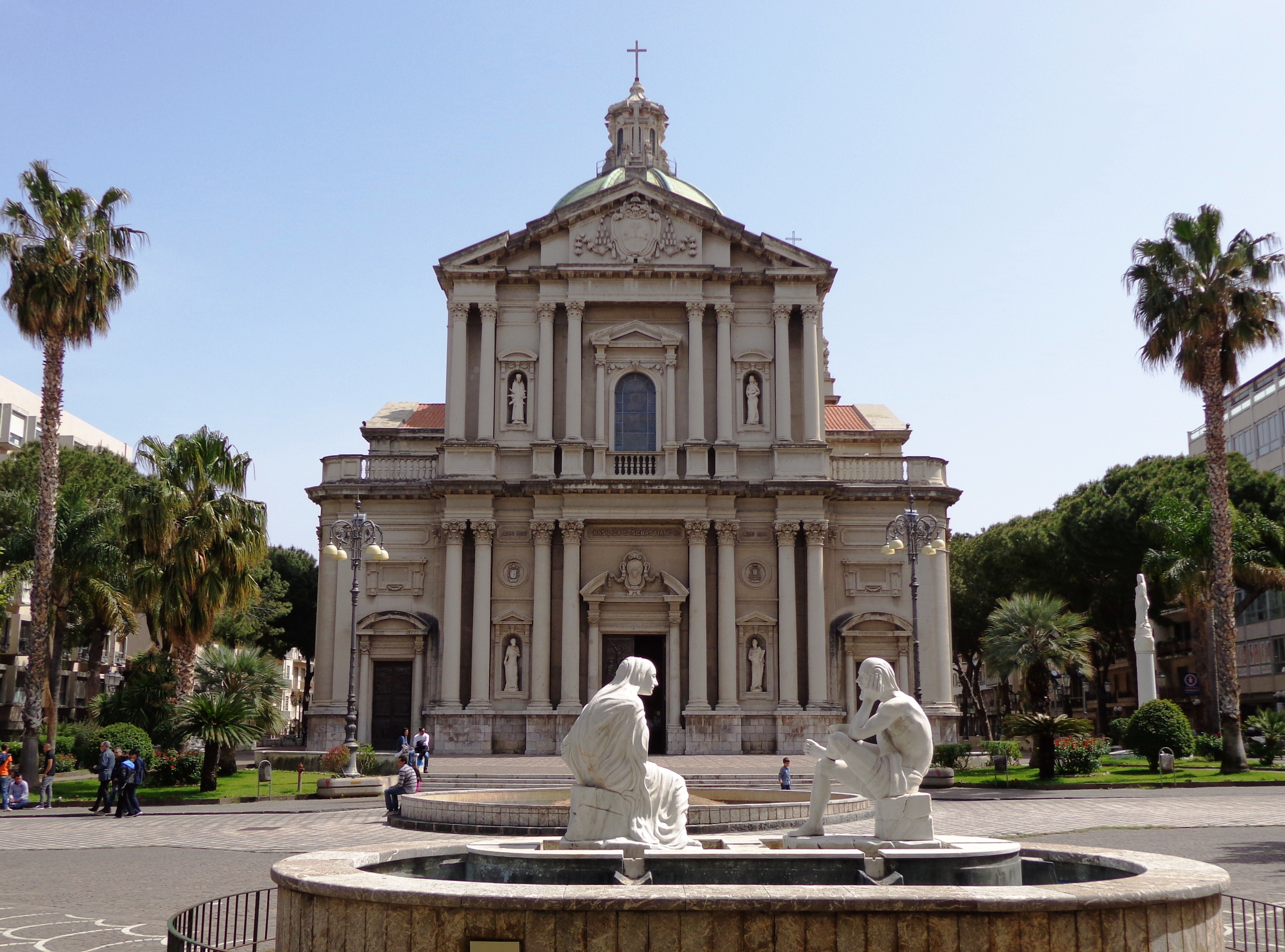 Basilica Minore di San Sebastiano Barcellona Pozzo di Gotto, Facciata.